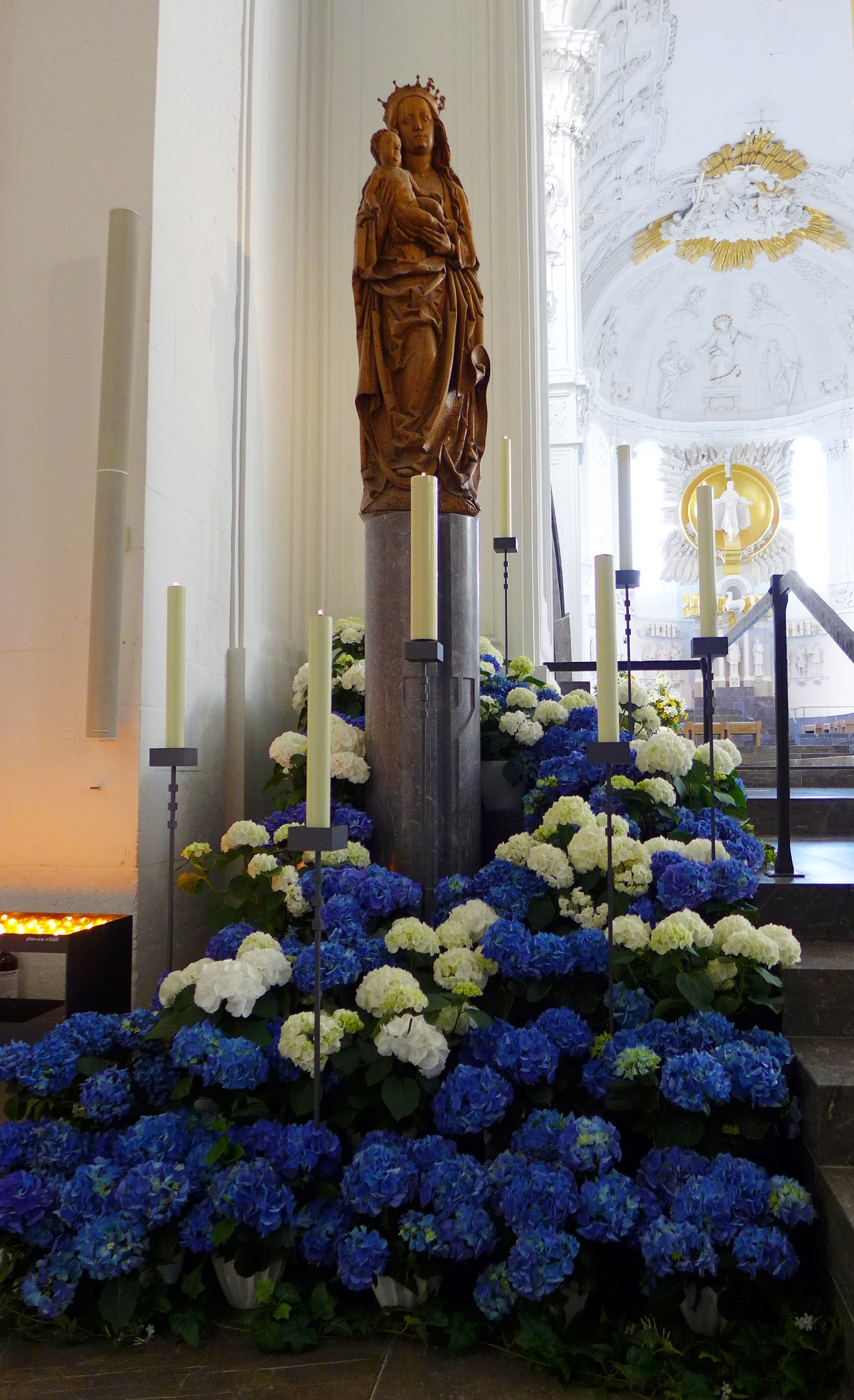 Würzburger Dom, Maialtar